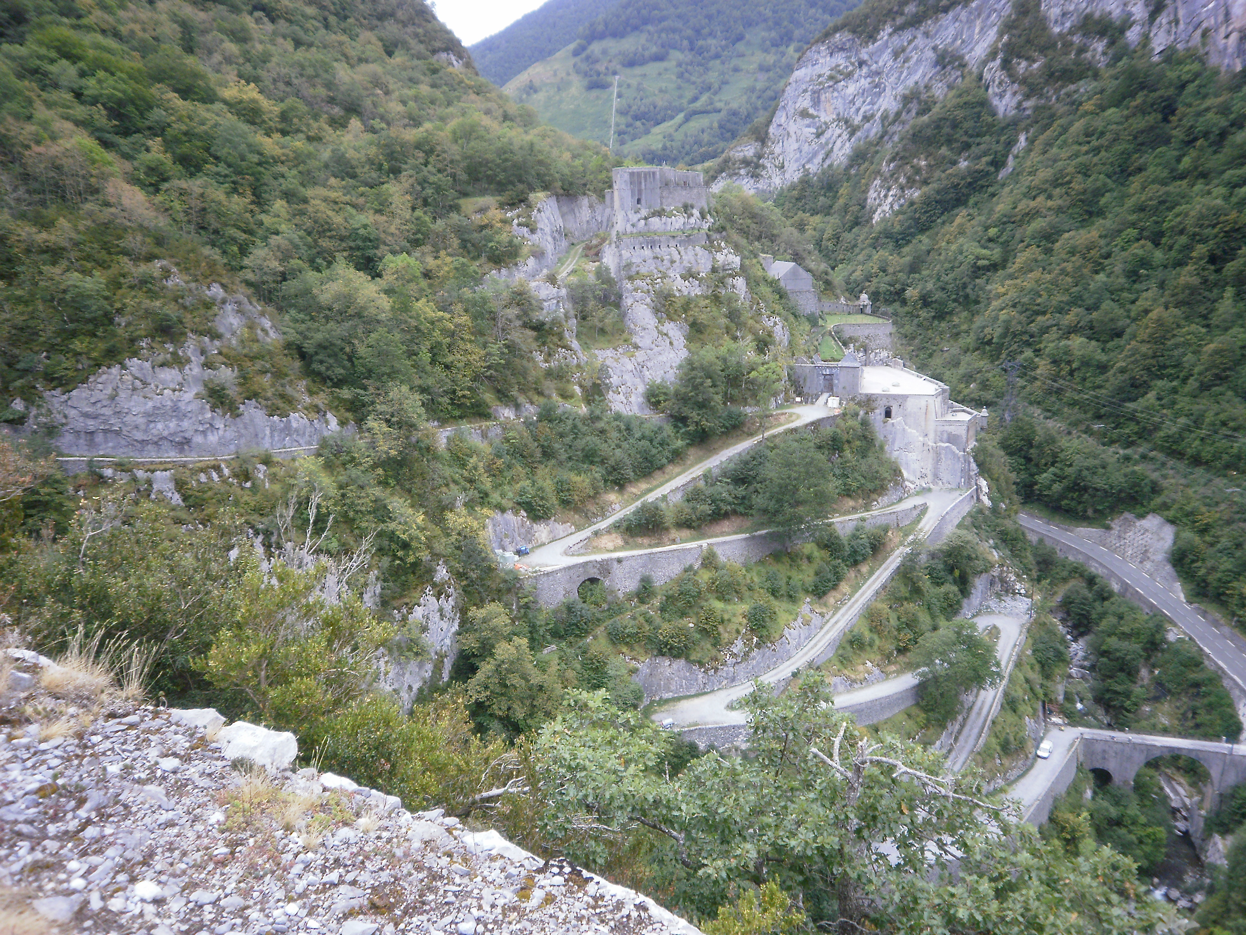 Fort du Portalet, sur les communes d'Etsaut et de Borce. Pyrénées-Atlantiques.